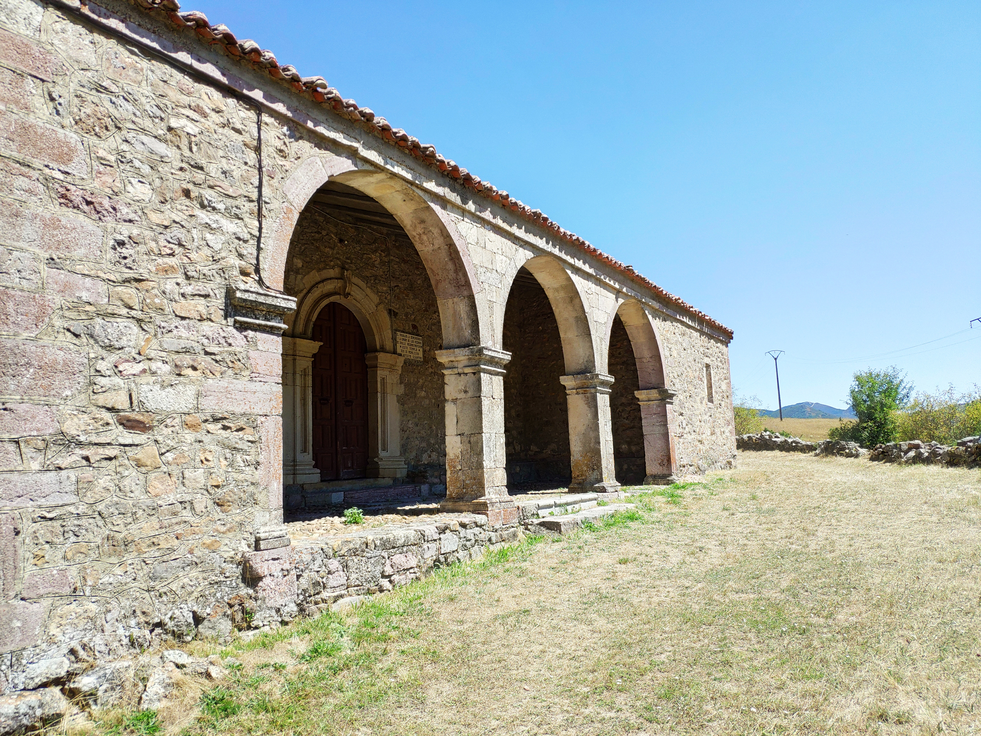 Iglesia de Oville dedicada a San Adriano en la actualidad.